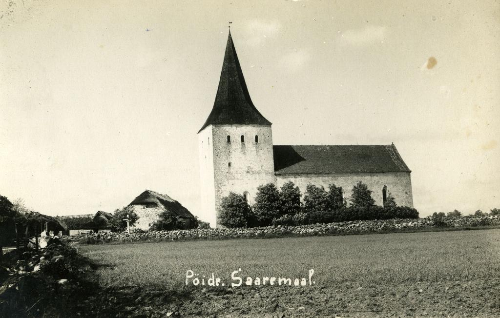 Pöide Maarja kirik, vaade lõunast